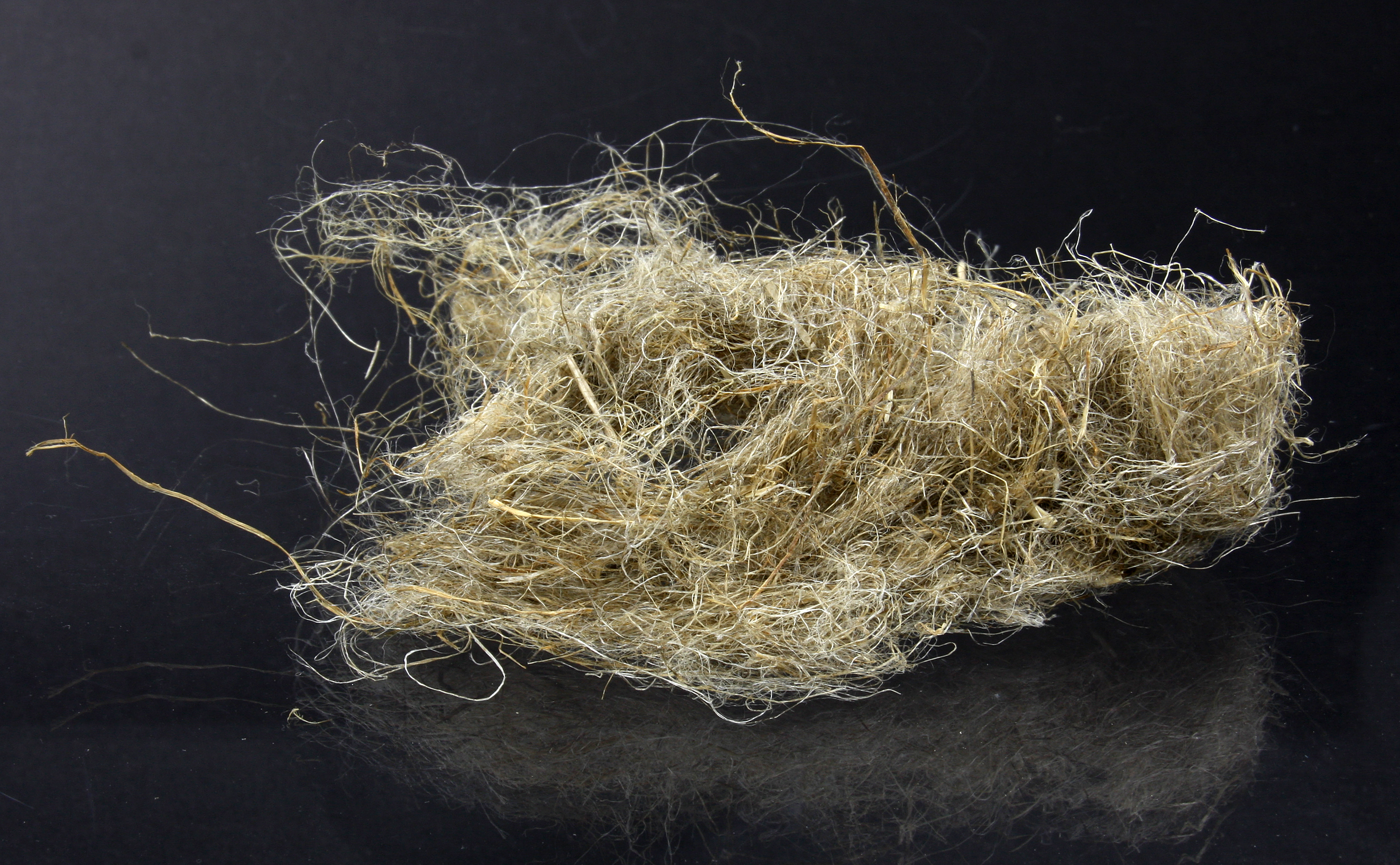 Flachs